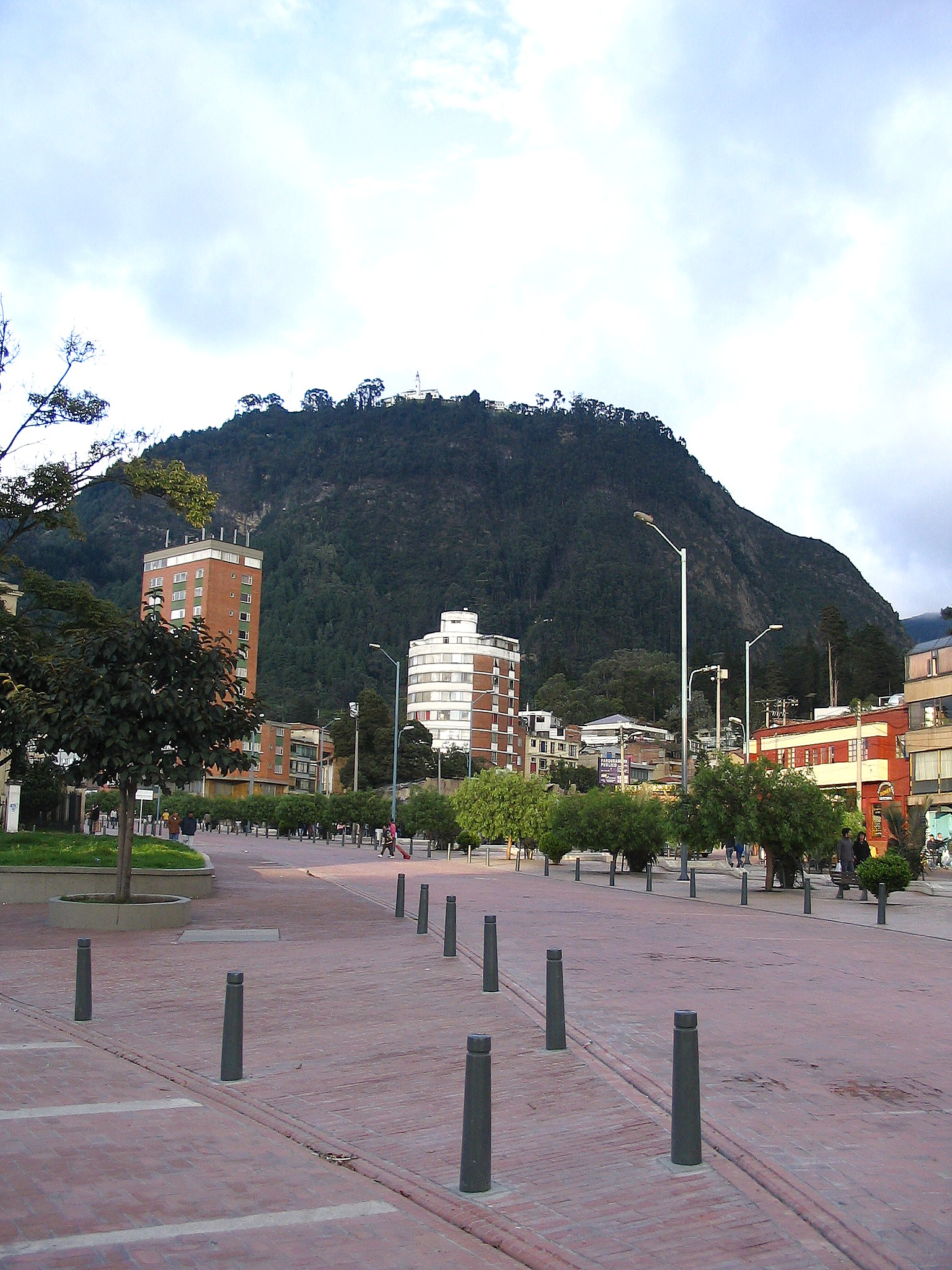 Fotografía del Cerro Monserrate desde el Parque de los Periodistas (Eje Ambiental) de Bogotá. Foto tomada por Tequendamia para la wikipeida. Categoría:Colombia (imagen)